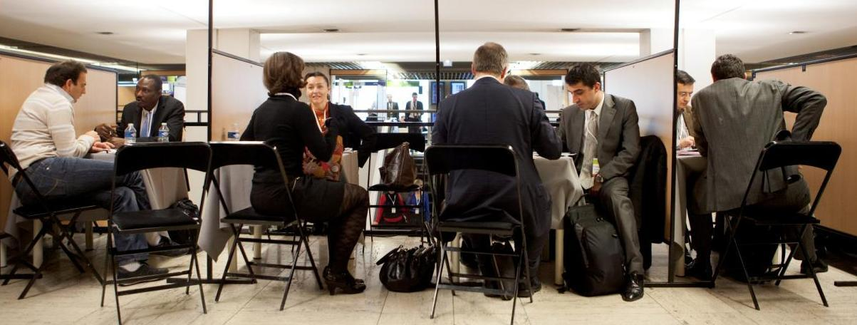 Convention d'Affaires : Rendez-vous sur boxs numérotés